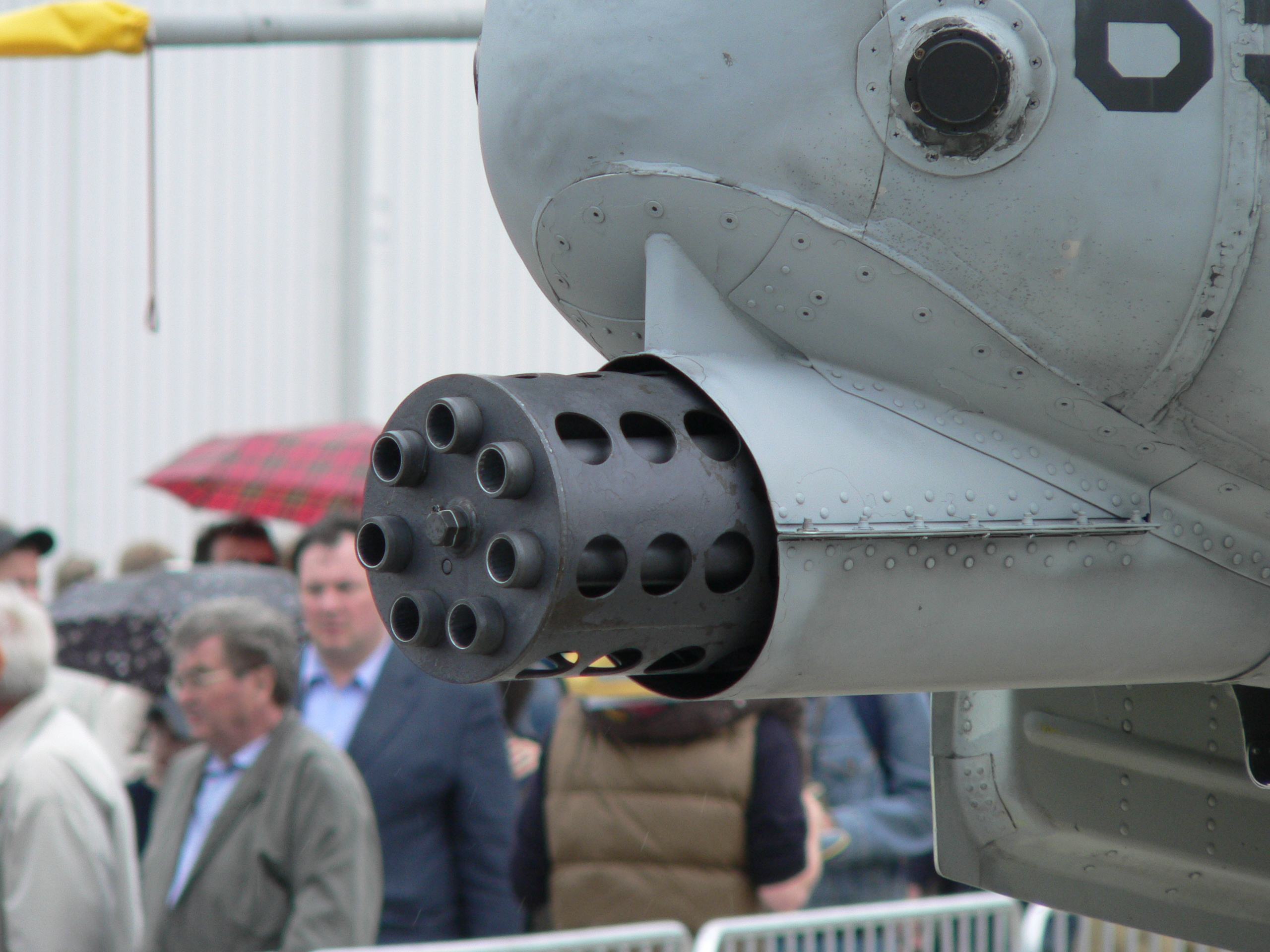 Mündungsrohre der GAU-8/A Avenger verbaut in einer Fairchild-Republic A-10, Bild selbst erstellt